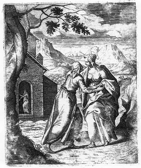 Сустрэча Марыі і Лізаветы. (з кнігі Rosarium...), 1672-1677 гг.